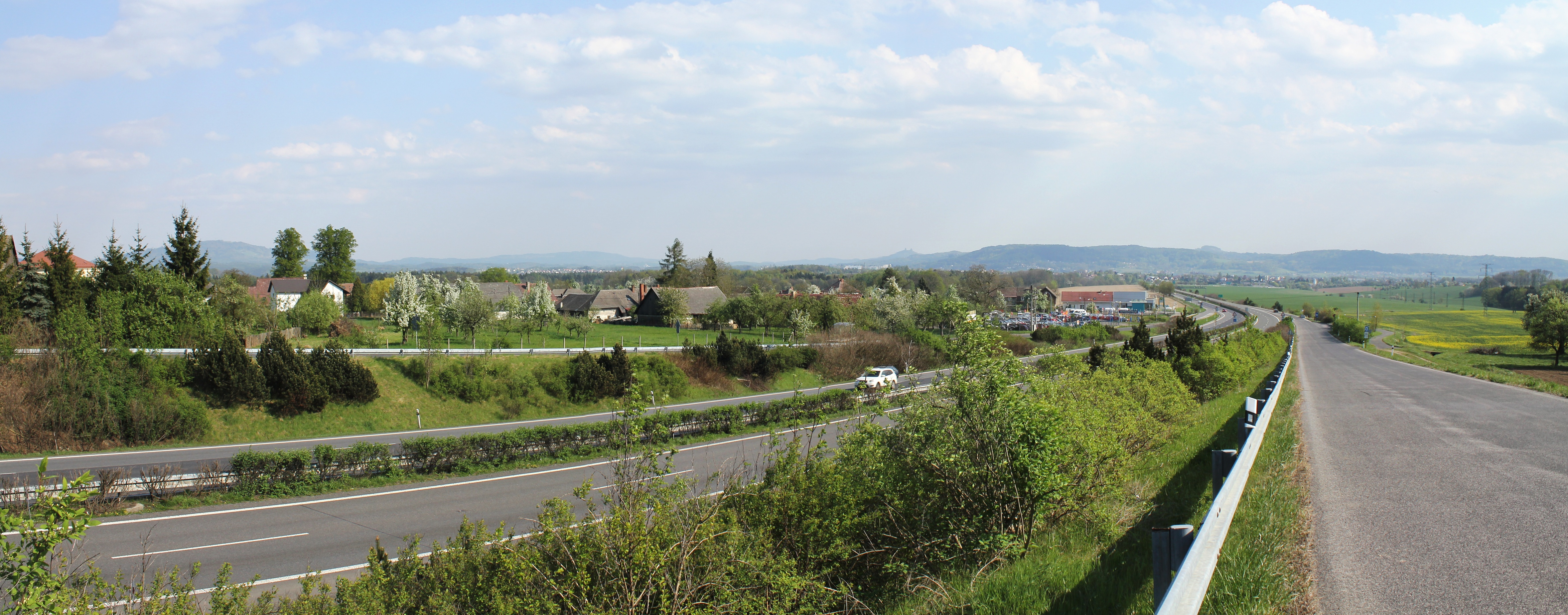 R35 u Paceřic